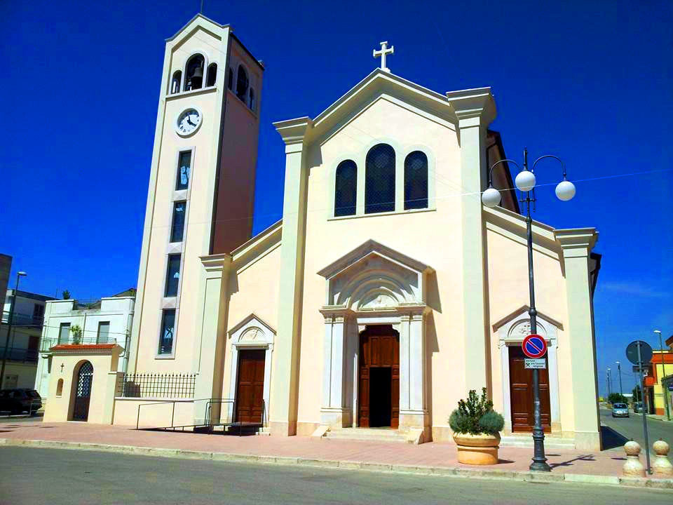 Parrocchia Maria Ss. Dei Sette Dolori, Poggiorsini